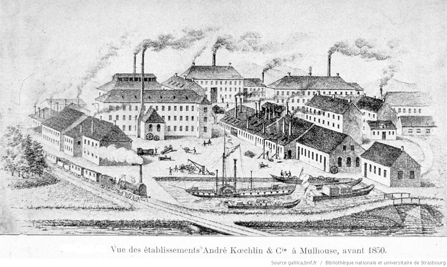 Les usines André Koechlin & Cie.